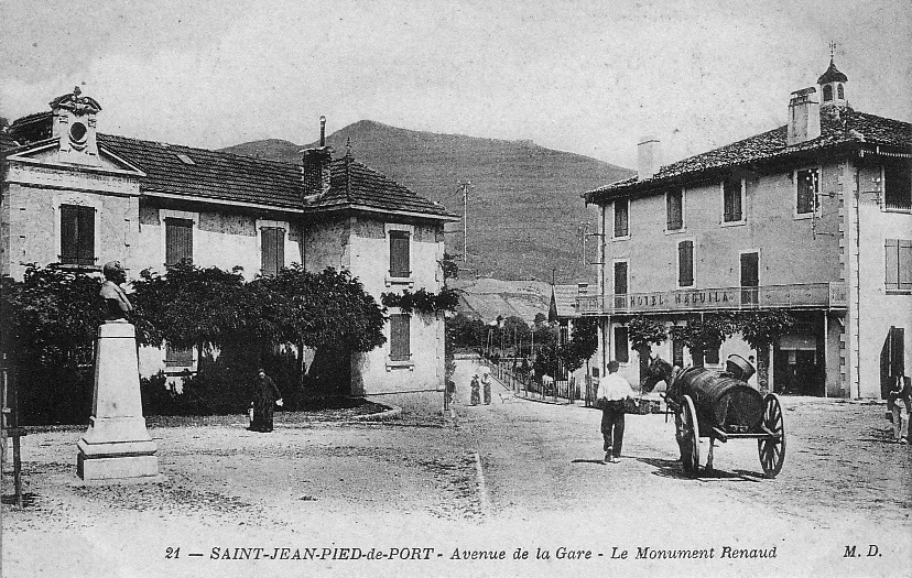 La rue de la gare au début des années 1910.